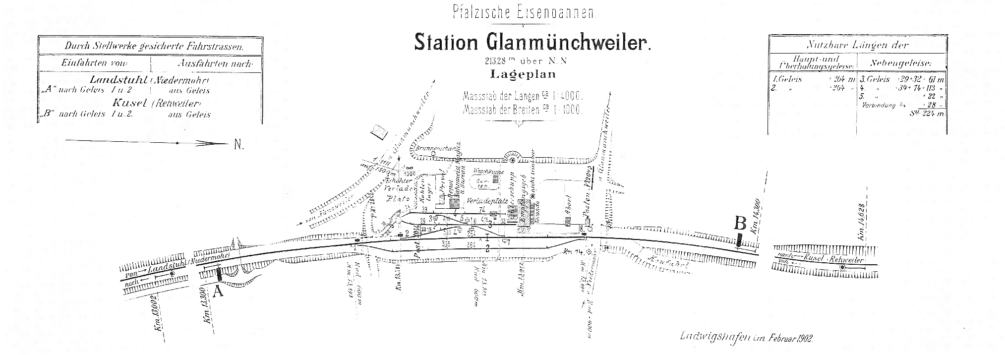 Gleisplan des Bahnhof Glan-Münchweiler im Jahr 1902